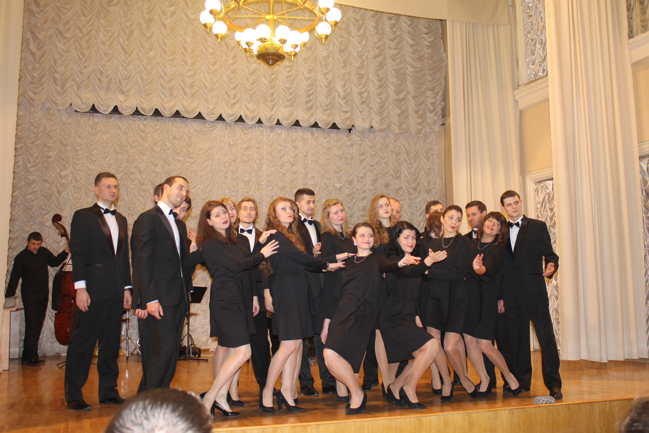 Хор Хрещакти, фото зх концерту 15.12.2015, програма програма "Шлягери звідсуіль".